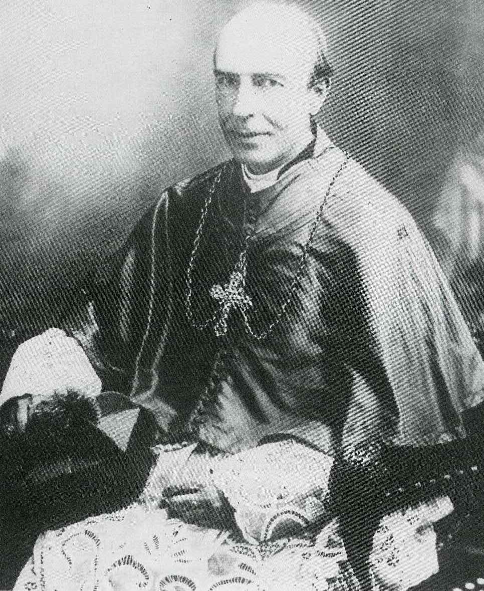 Emile Seghers (1855-1927) - bisschop van Gent van 1916 tot 1927. - Gent - Oost-Vlaanderen - België